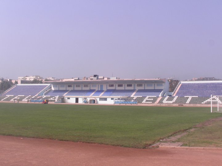 Стадион Нико Дована